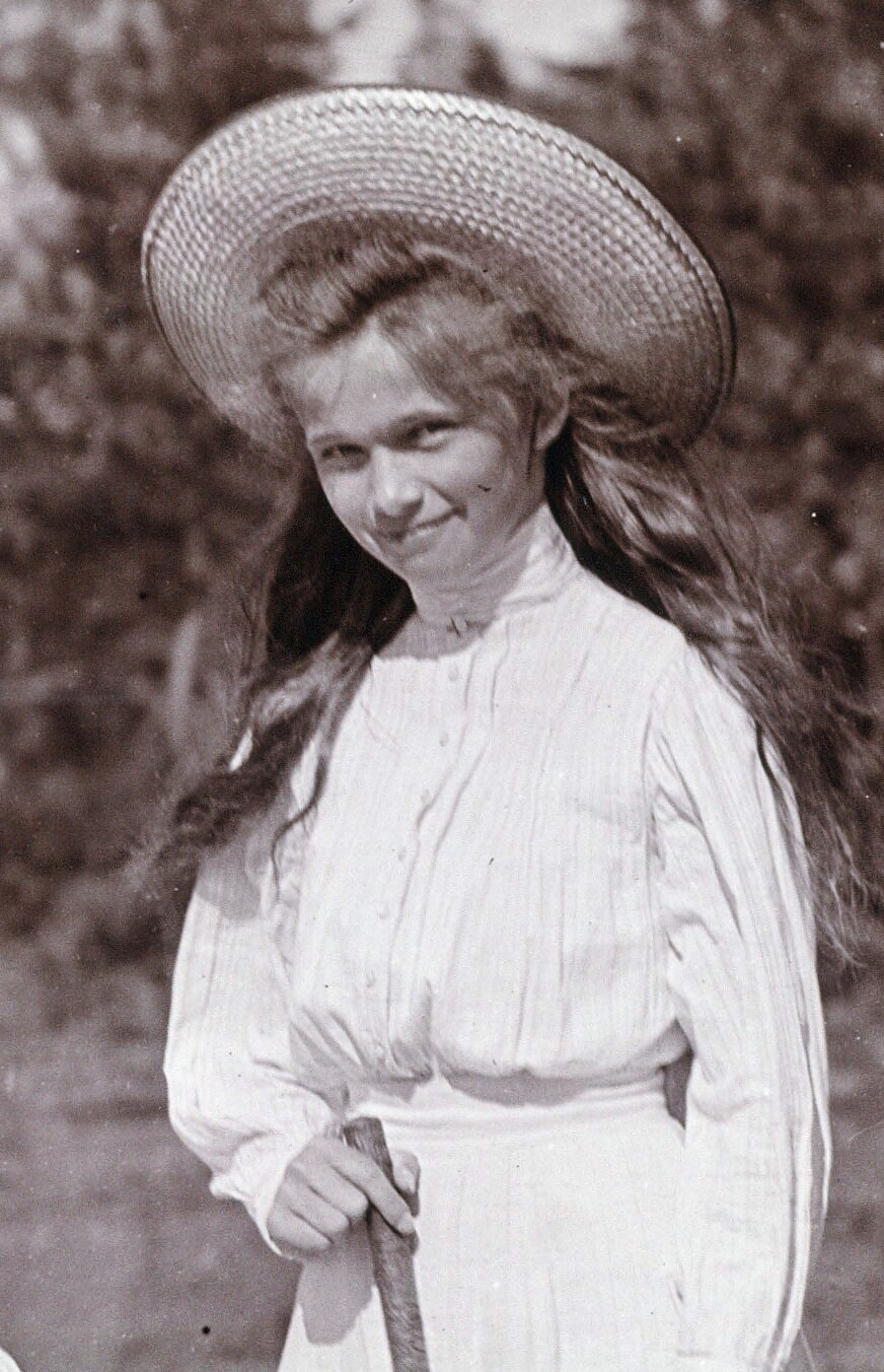 ニコライ2世の長女オリガ（1906年頃）